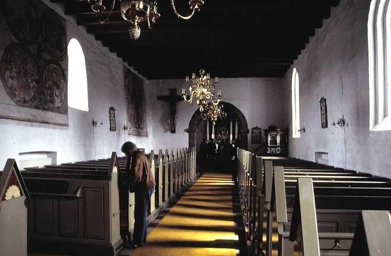 Vrå Kirke i Danmark. Skibet set mod øst